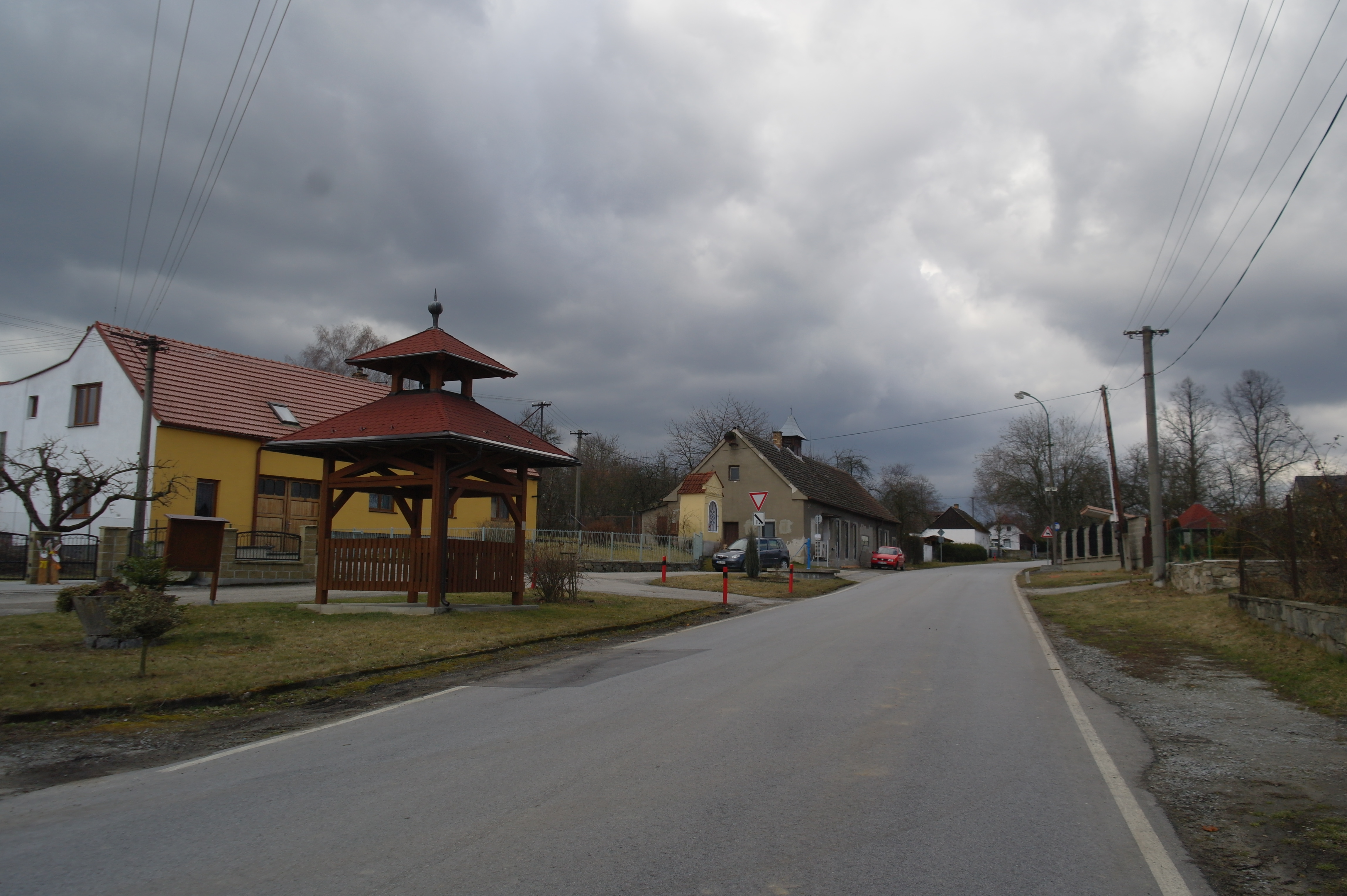 Bukvice, náves